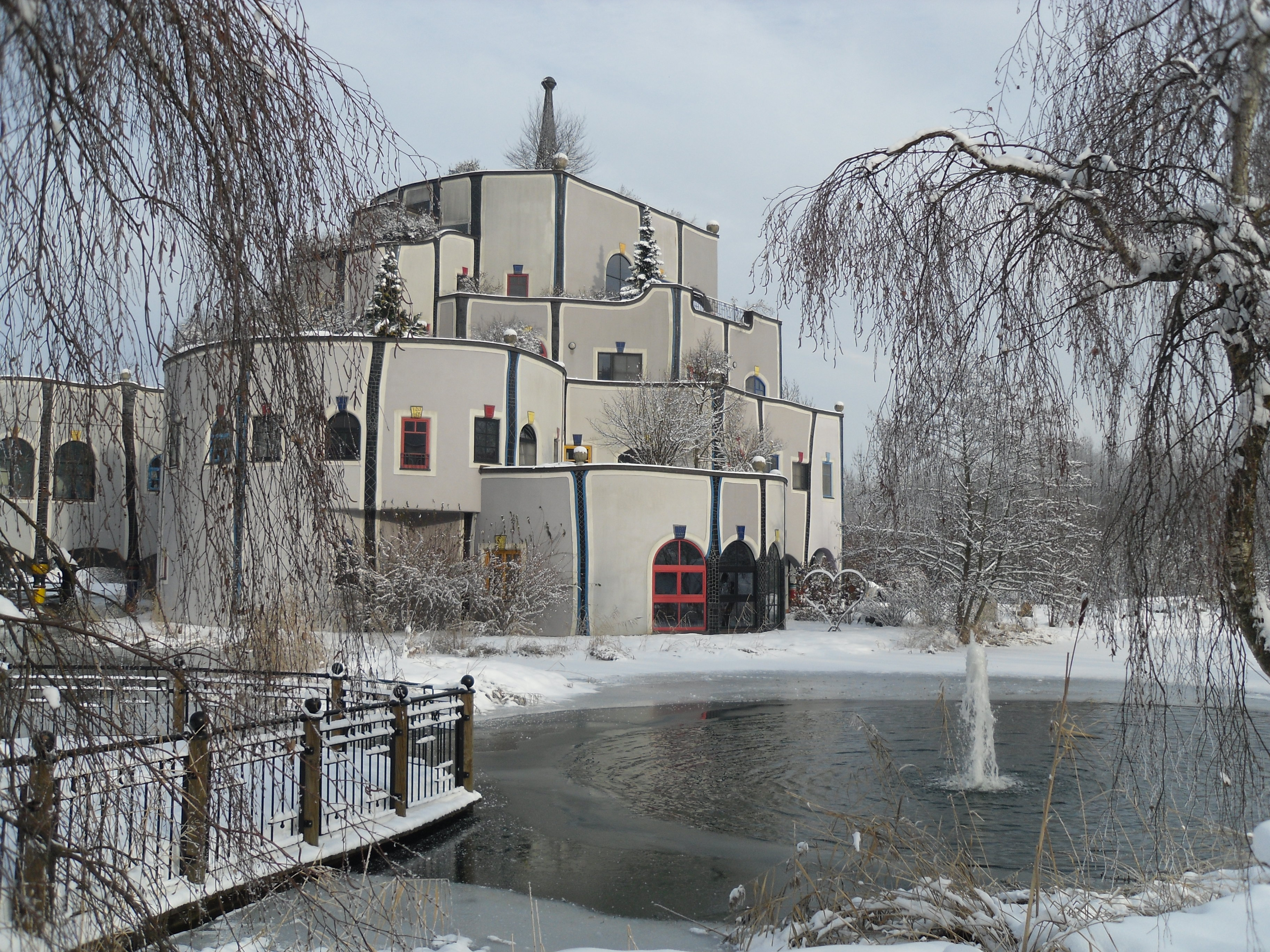 Rogner Bad Blumau im Winter, Steiermark